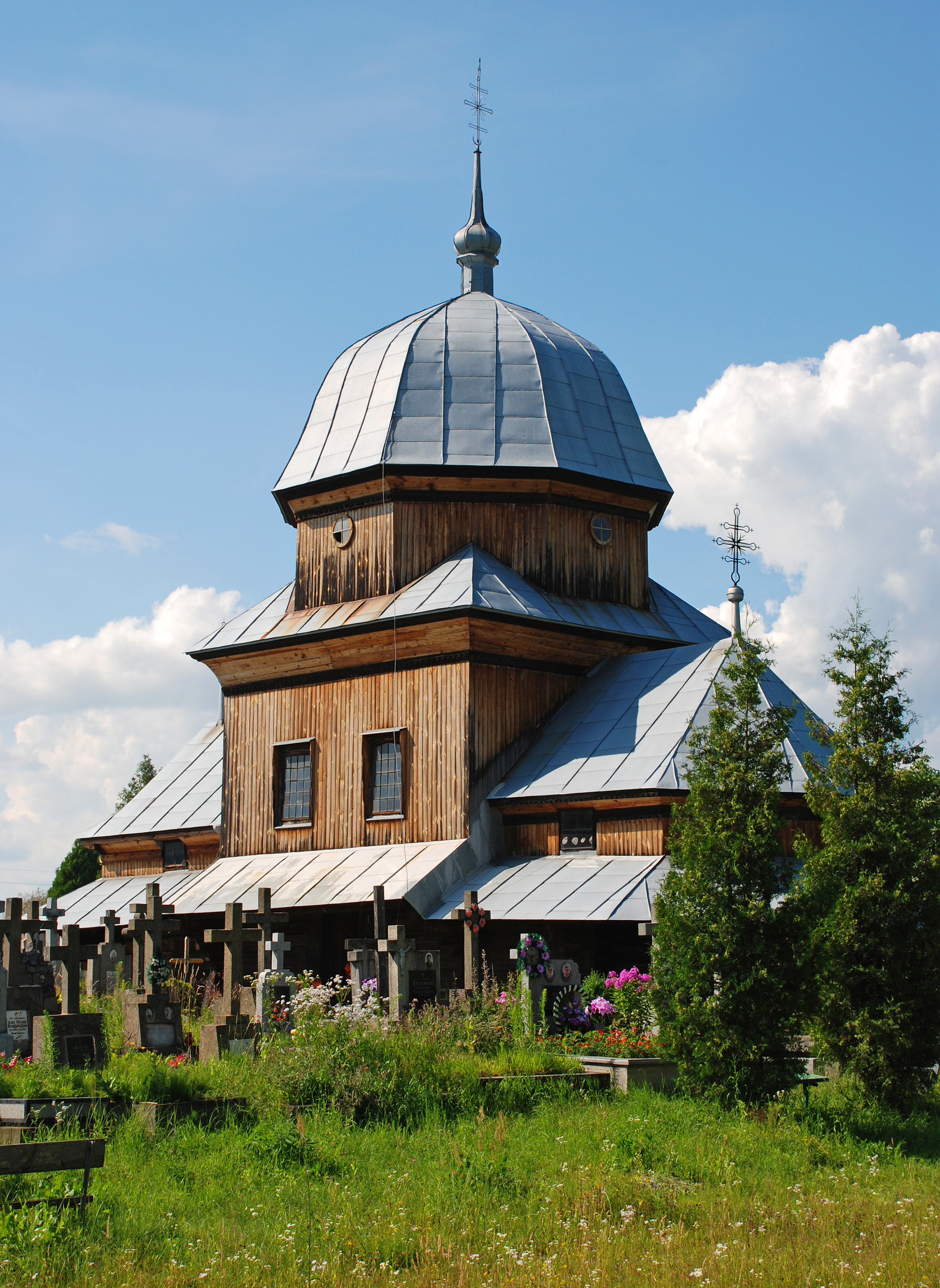 Церква Різдва Пресвятої Богородиці (дер.), Жовква, вул.І.Франка, 9 (Винники)